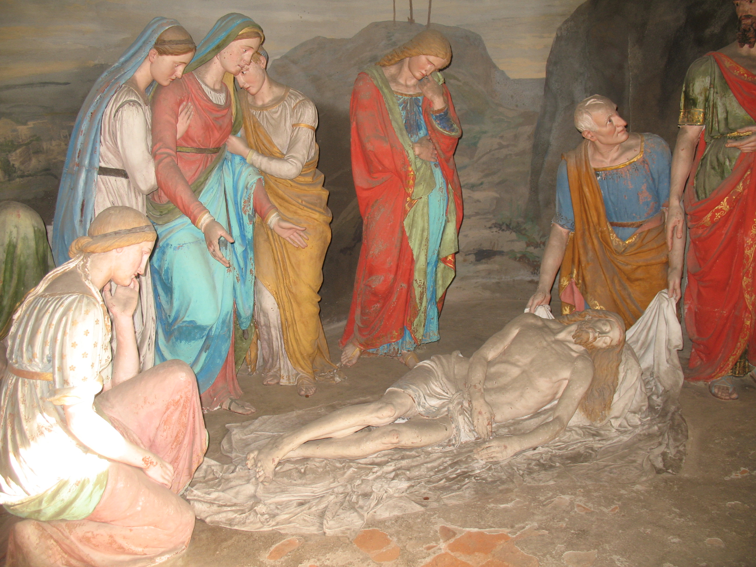 Sacro Monte di Varallo: Cappella XLI, Gesù deposto nella Sindone. Statue di Luigi Marchesi (1826). Affreschi di Pier Celestino Gilardi (XIX secolo)